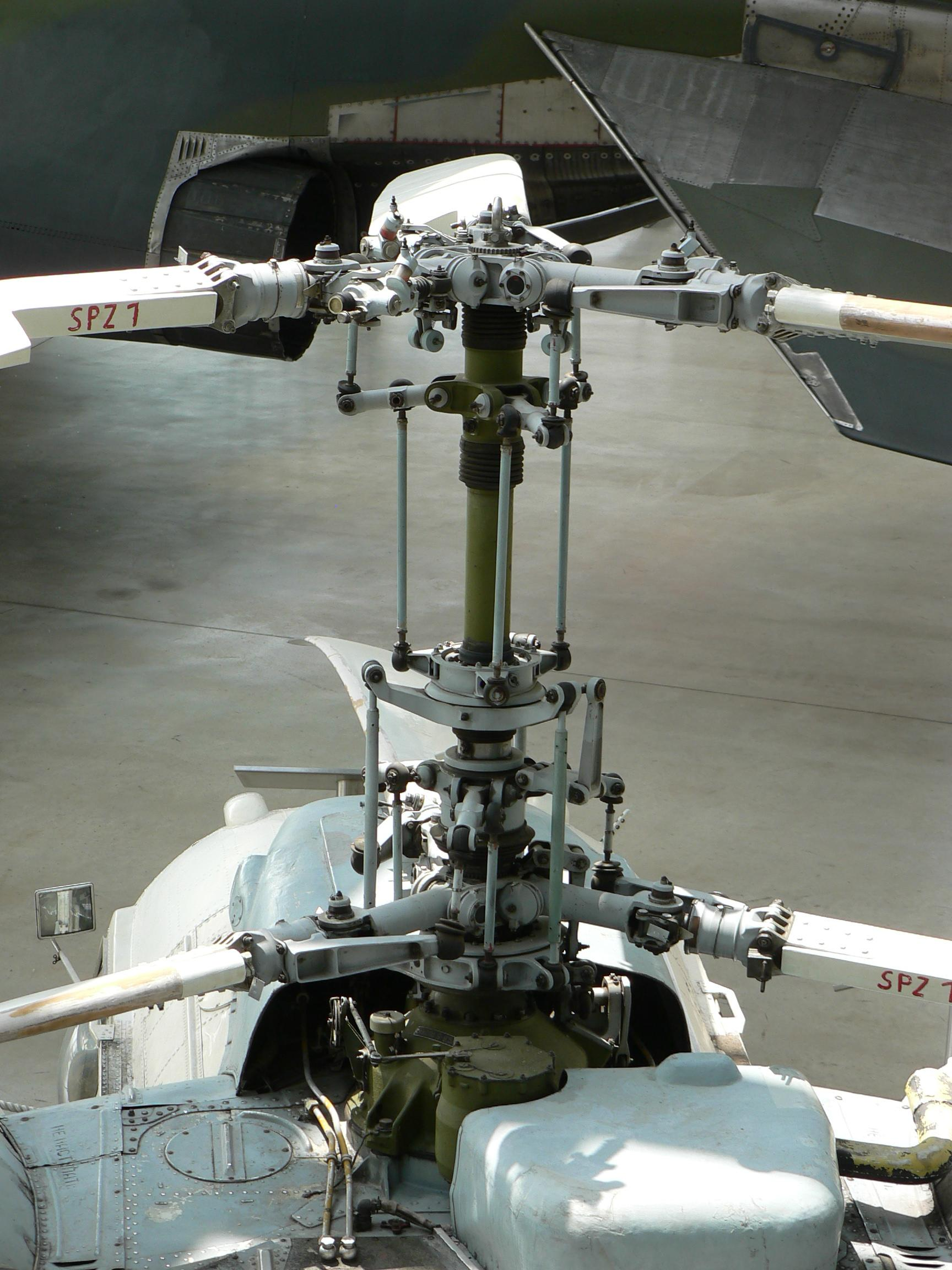 Deutsches Museum Munich Photo by Jean-Patrick Donzey